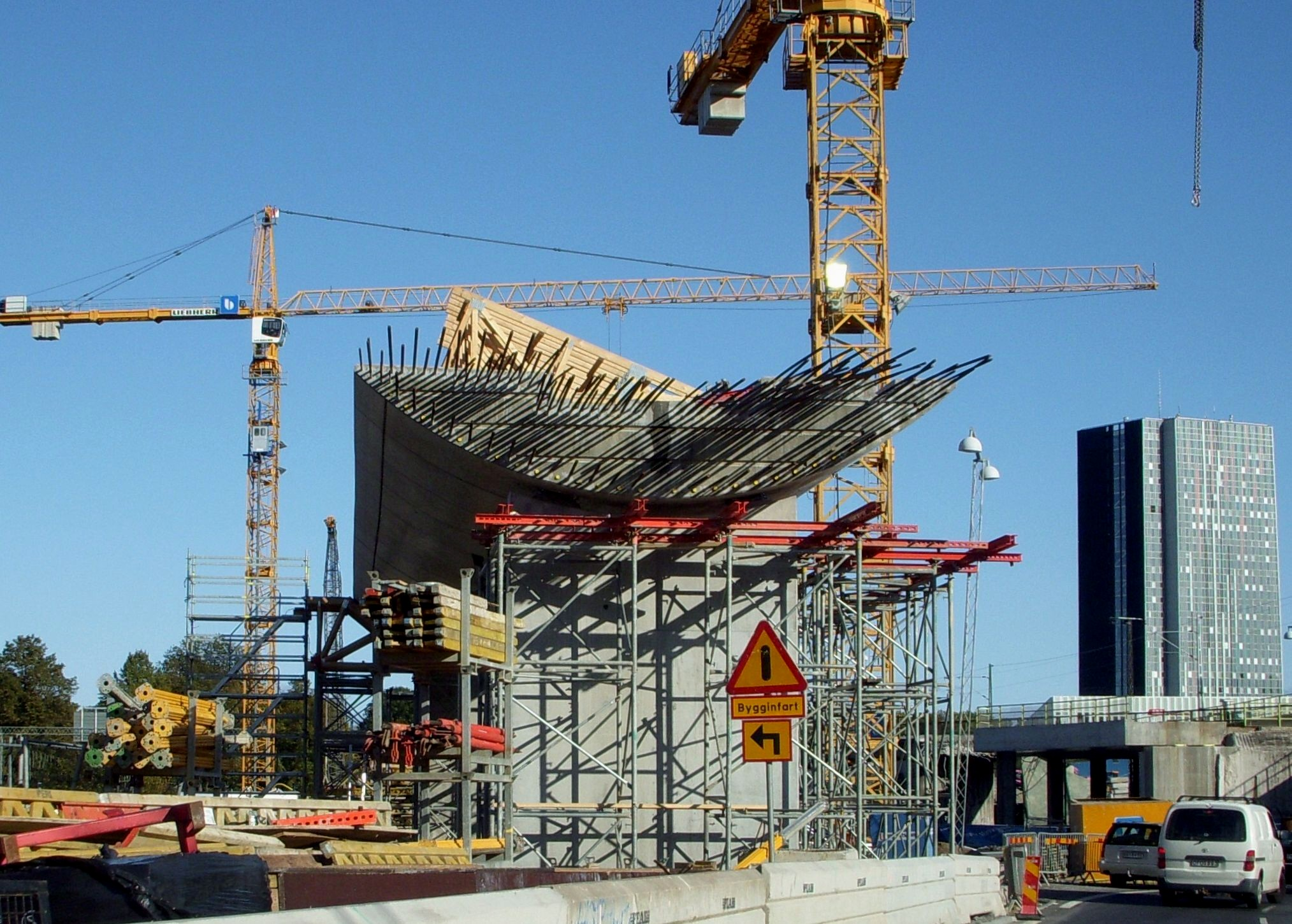 Norra Länken i Stockholm, arbeten med Värtabanans nya viadukt vid Norrtull